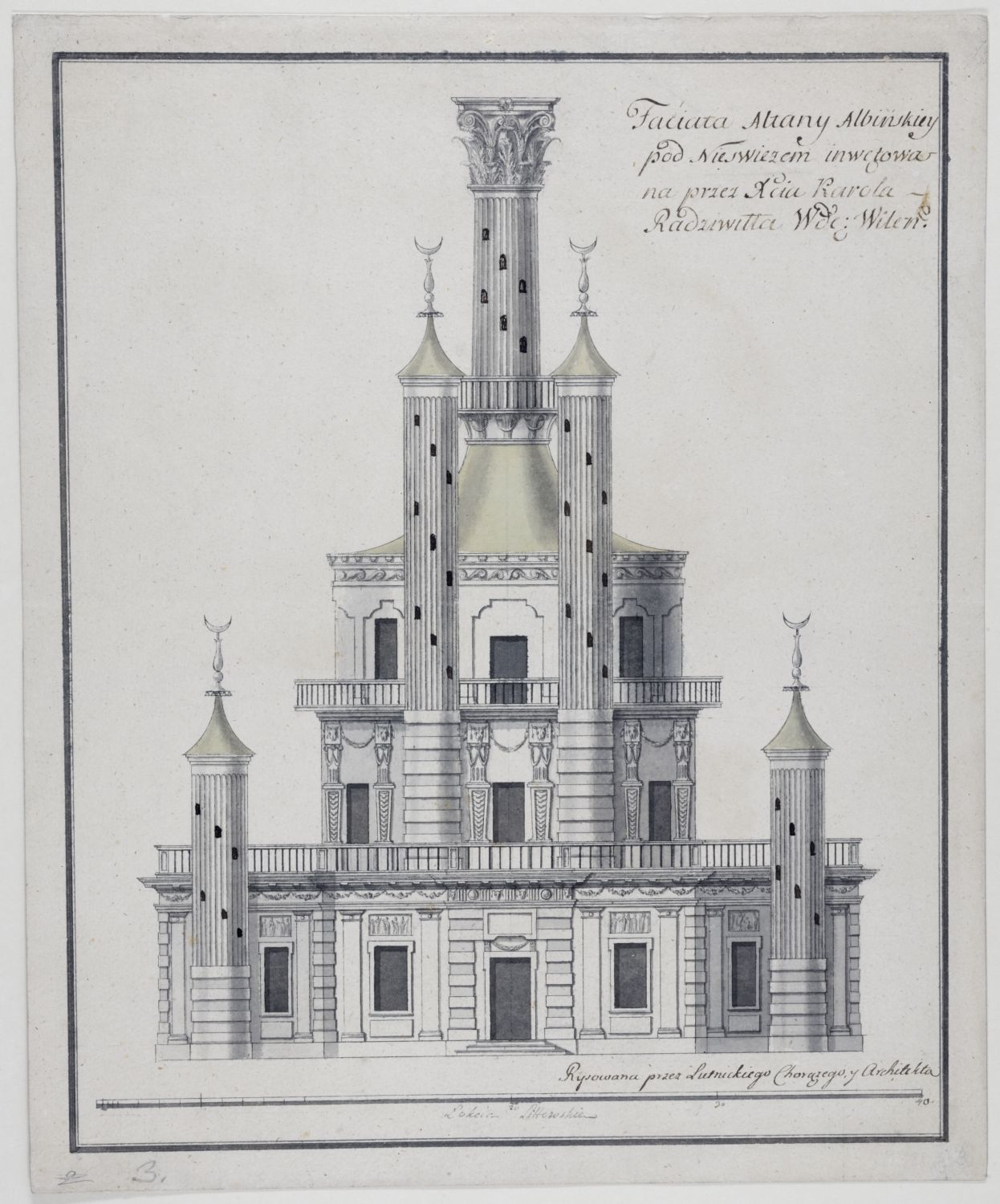 Беларуская (тарашкевіца): Нясьвіж (Niaśviž), Альба (Alba). Праект альтанкі